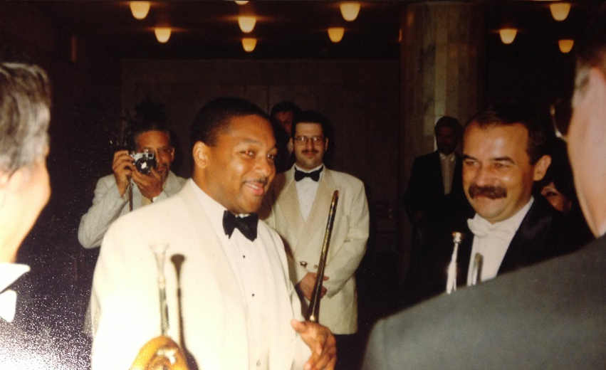 Совместный концерт с В. Марсалисом и его джаз-оркестром